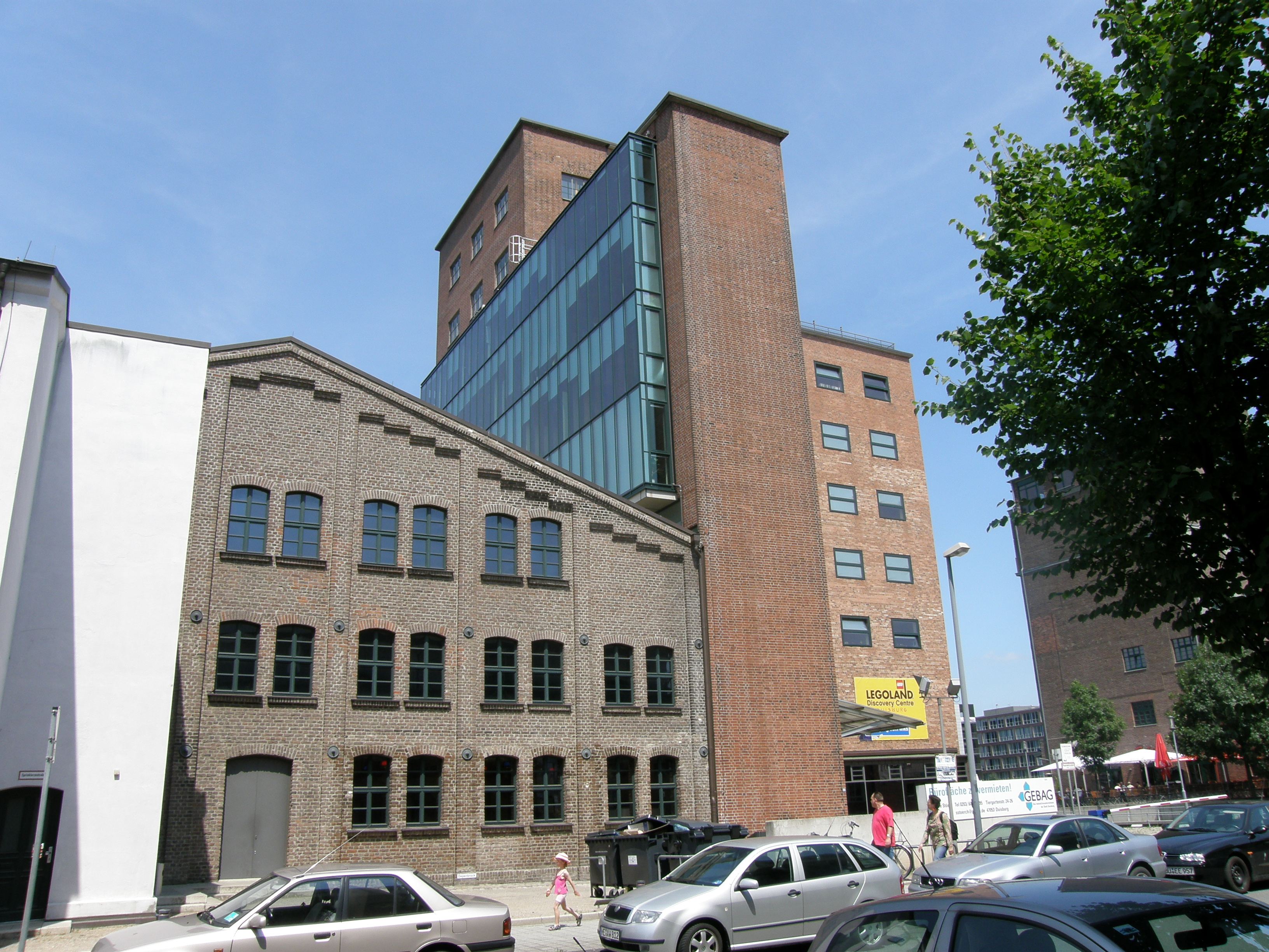 Fassadendetail an der ehemaligen Werhahnmühle im Duisburger Innenhafen mit großflächiger, vorgesetzter Glasfront.